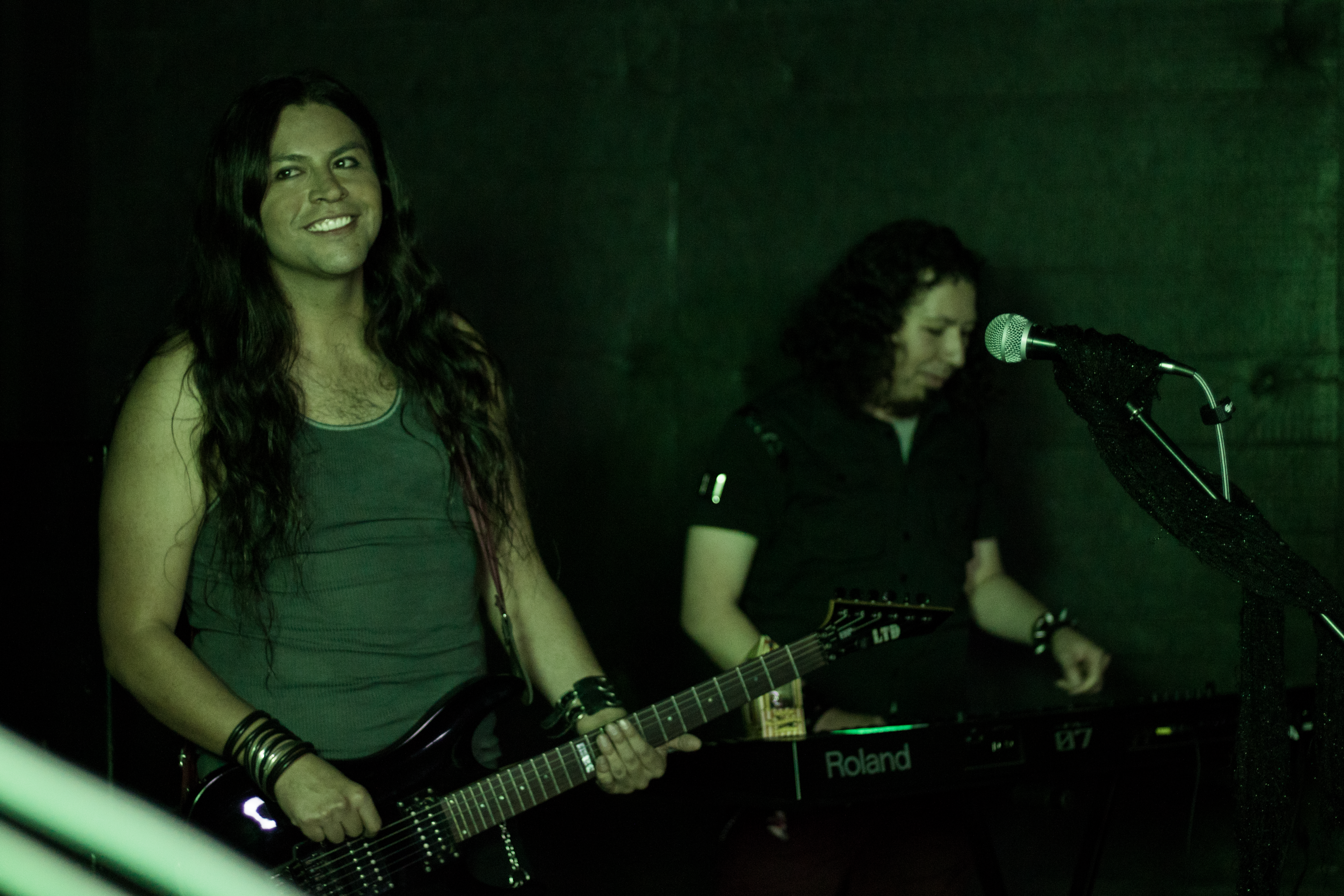 Demian Warheart y John Rai en la grabación del videoclip de Death Eaters.